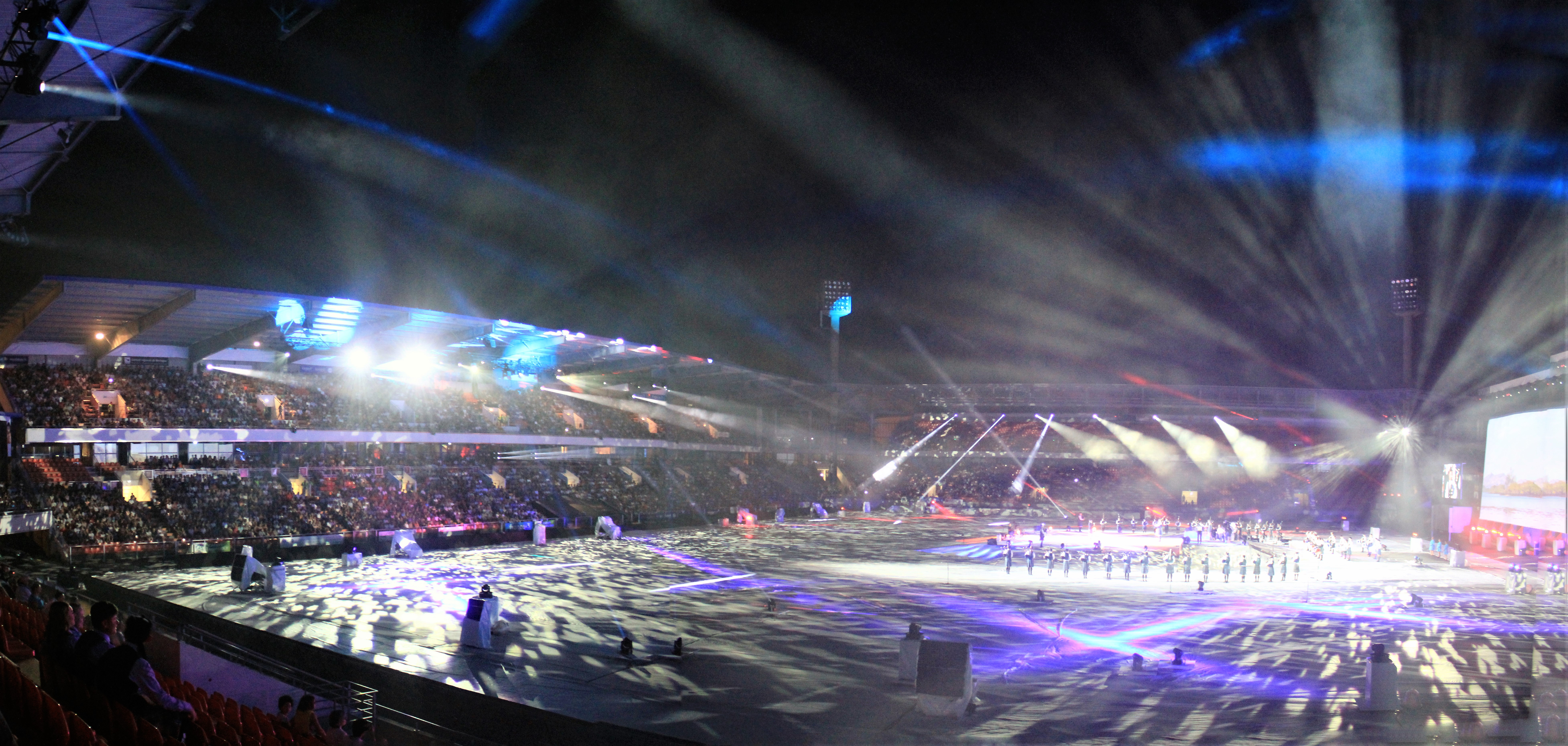 Le stade du moustoir pendant les nuits magiques du festival interceltique de Lorient 2018